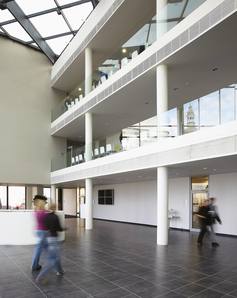 Vestibul ŠAVŠ